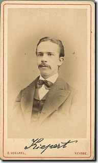 Fotografie des Mathematikers Ludwig Kiepert